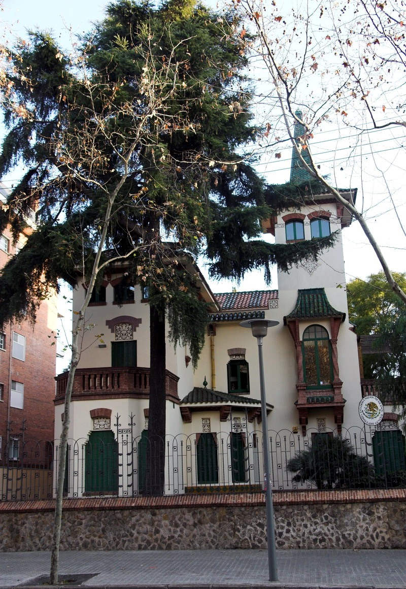 Casa Muley-afid (Barcelona-Catalunya), obra de Josep Puig i Cadafalch 1914. Psg. Bonanova, 55. Vista general.